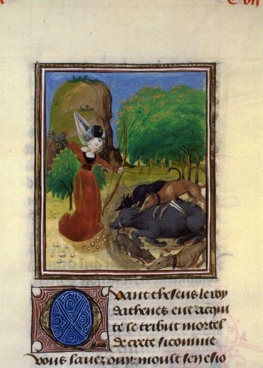 Atalante et le sanglier de Calydon